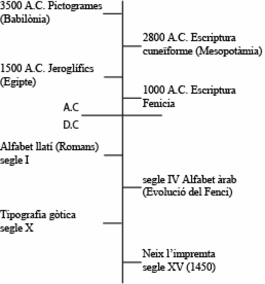 Gràfic evolució amb les dates més rellevants de la tipografia.